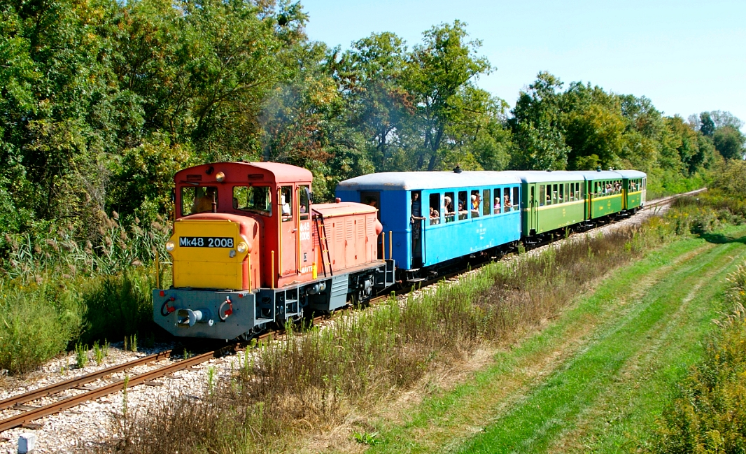 Kisvasúti napi különvonat a Balatonfenyvesi Gazdasági Vasúton